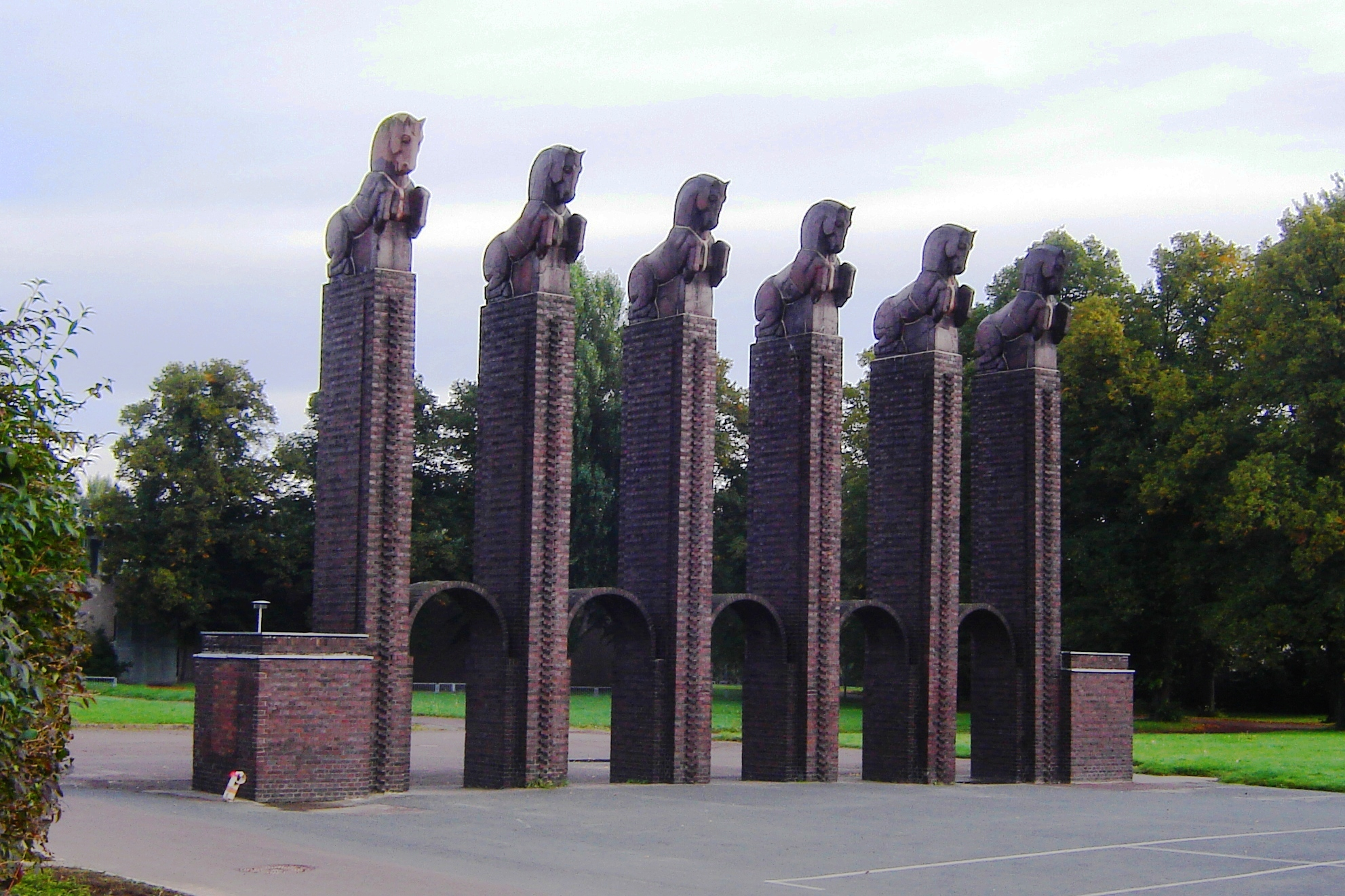 Magdeburg-Rothehorn, Pferdetor (Kulturdenkmal)